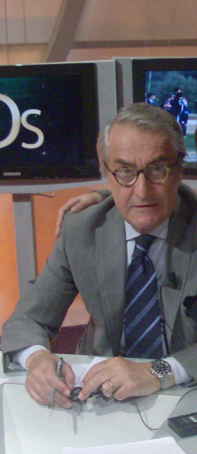 Elio Corno nel 2012